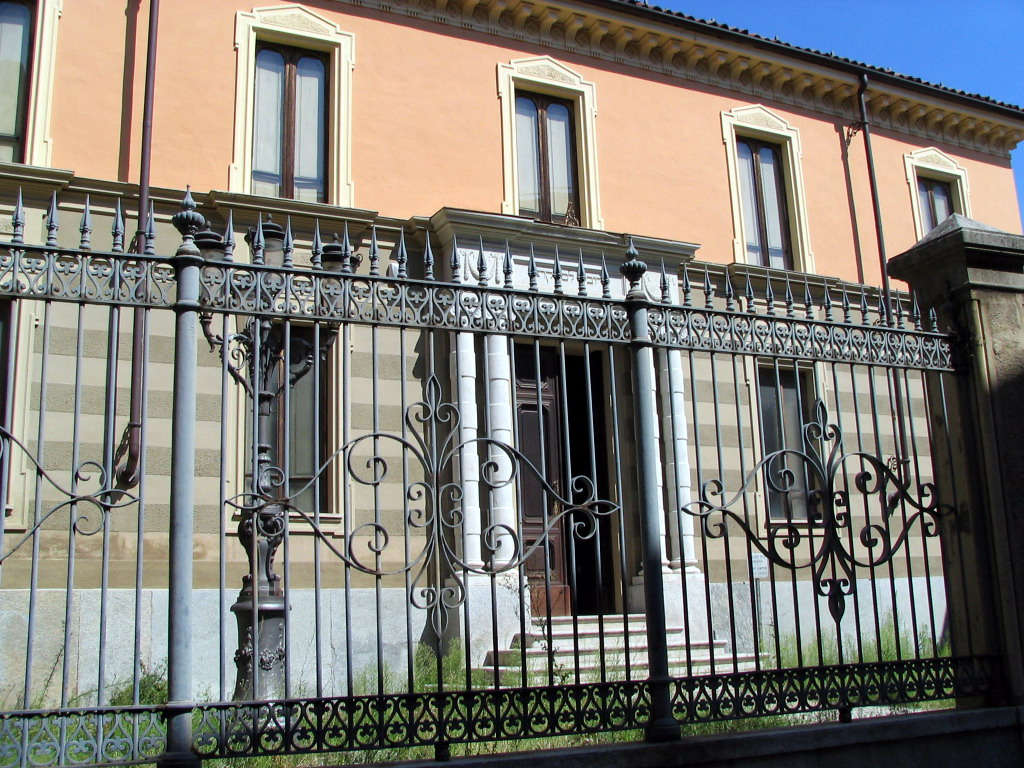 Sinagoga di Asti